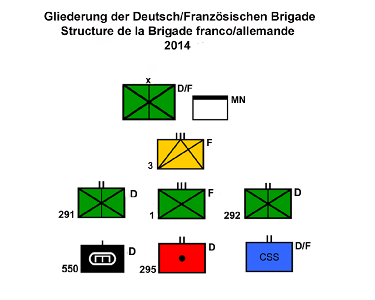 Gliederung der deutsch-französischen Brigade im Jahre 2014